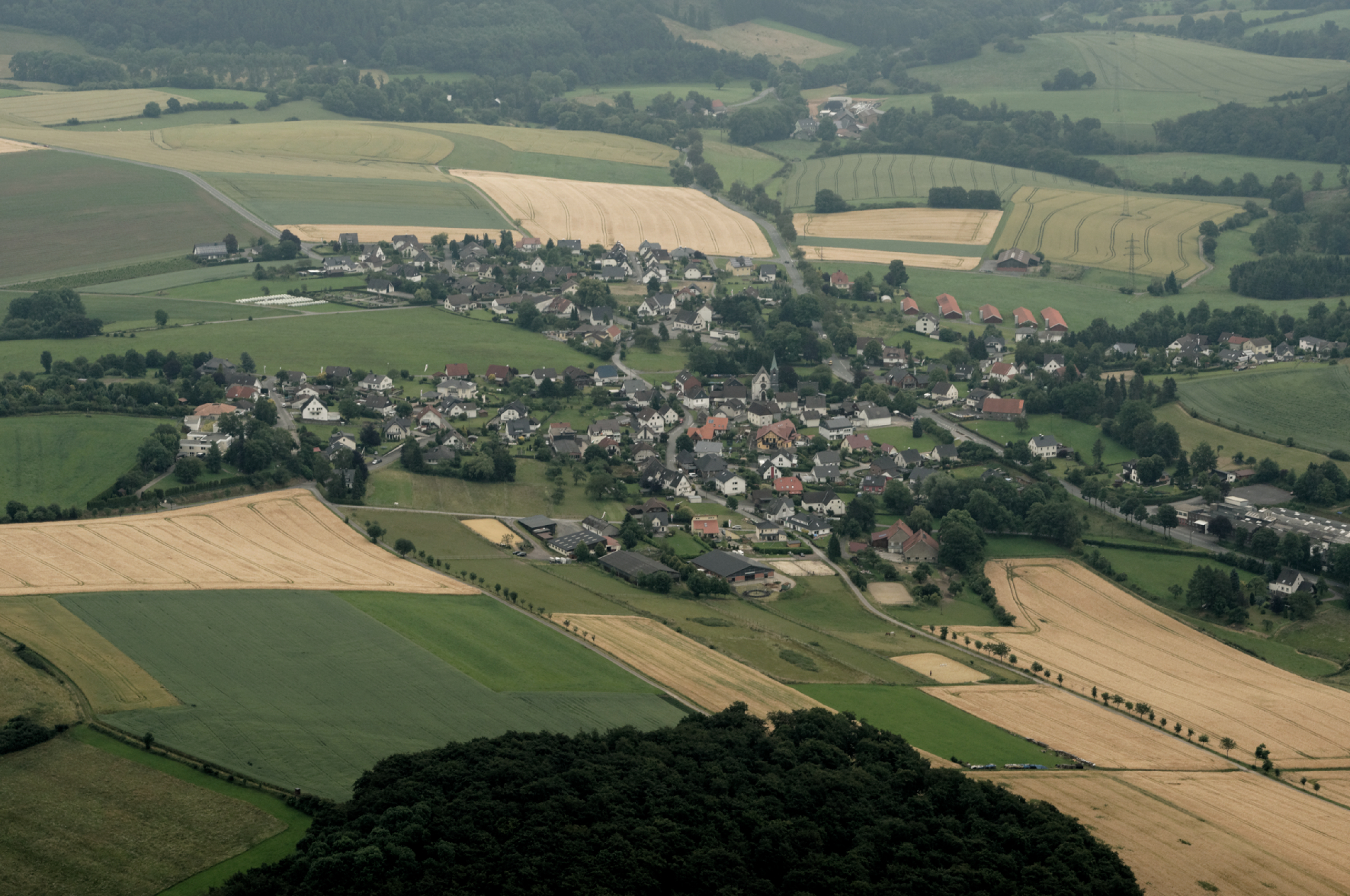 Fotoflug Sauerland Nord. Sundern (Sauerland)-Hövel, Blickrichtung Ost